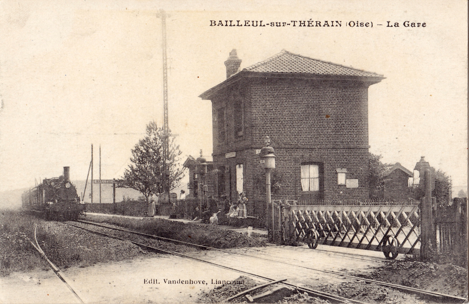 Carte postale ancienne éditée par Vandenhove à Liancourt : BAILLEUL-SUR-THERAIN - La Gare